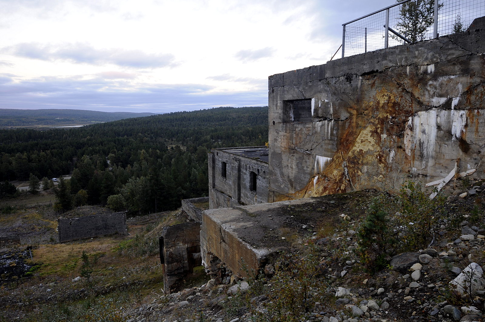 Rester etter vaskeriet ved Røstvangen gruver